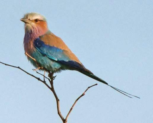 Afrikaanse Scharrelaar